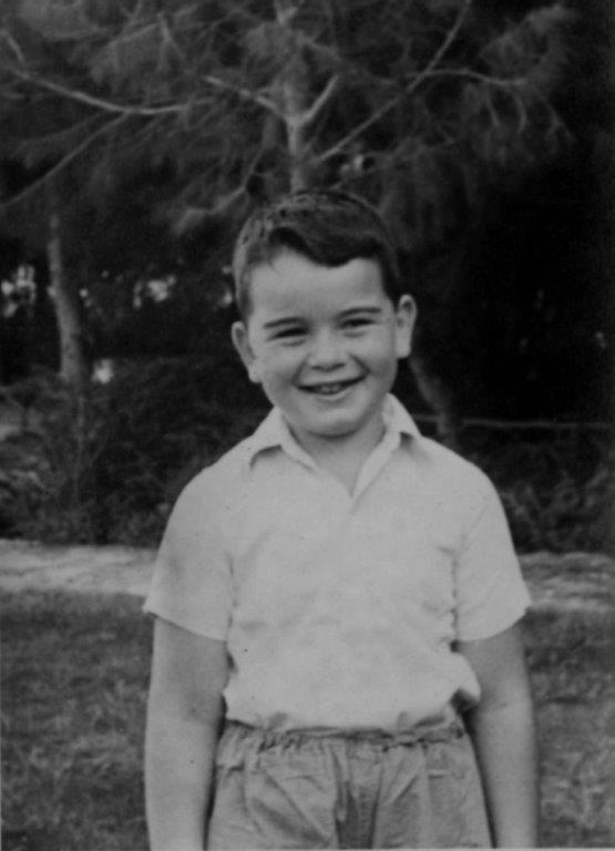 יוסי ורדי נכדם של חיותה ויוסף בוסל, היה ראש המועצה האזורית עמק הירדן